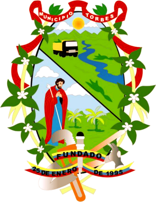 Escudo del municipio Torbes del estado Táchira y de su capital San Josecito, en formato PNG. -En proceso de vectorización